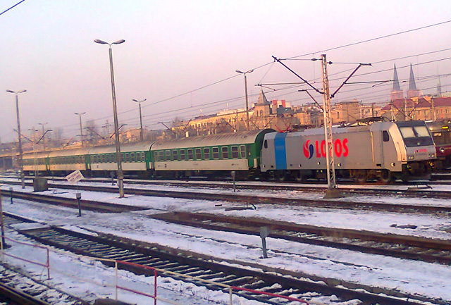 Skład Kolei Śląskich (lokomotywa należąca do LOTOS Kolej i 4 wagony pożyczone od České dráhy)